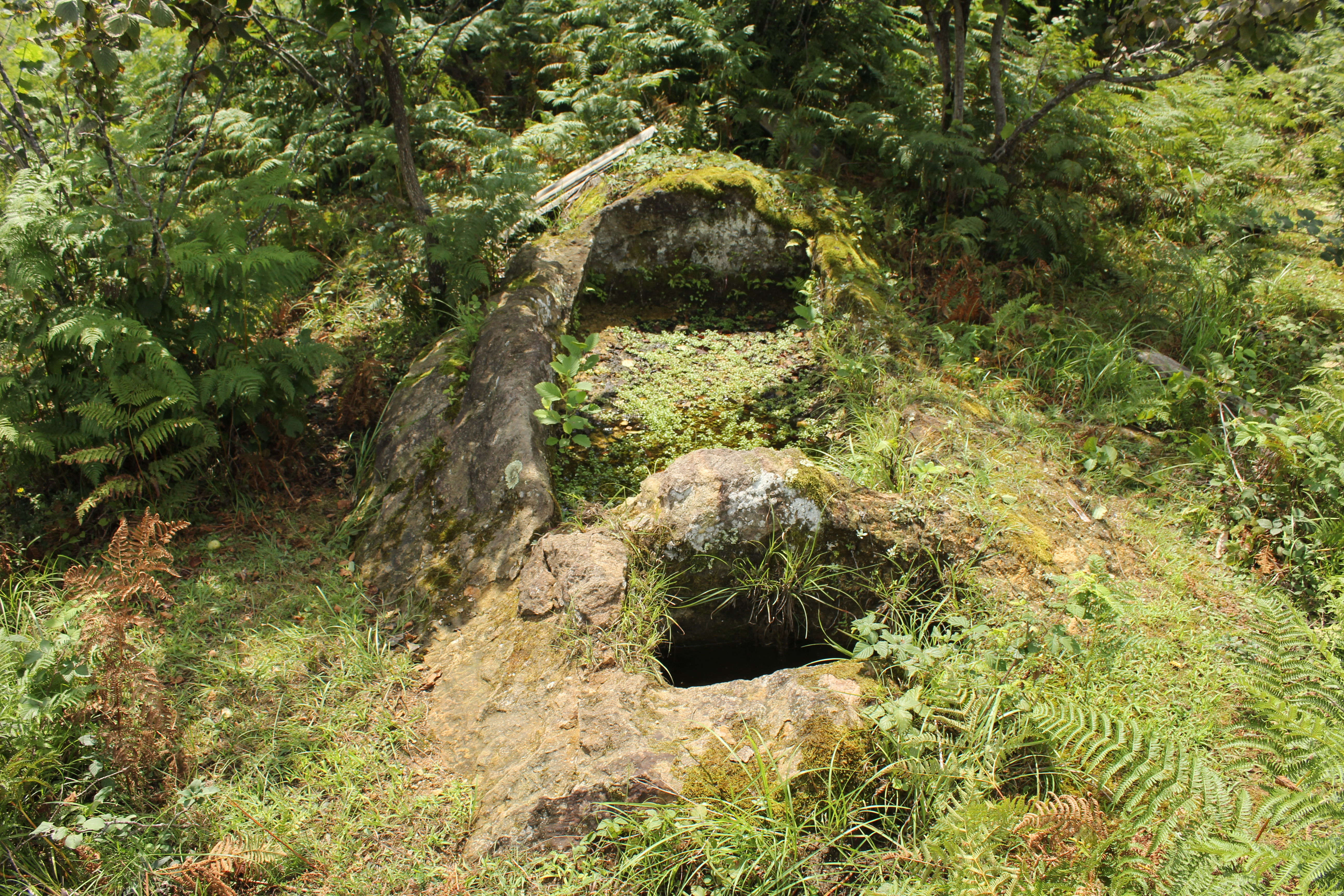 ქვაში ნაკვეთი საწნახელი, სოფელი გონებისკარი